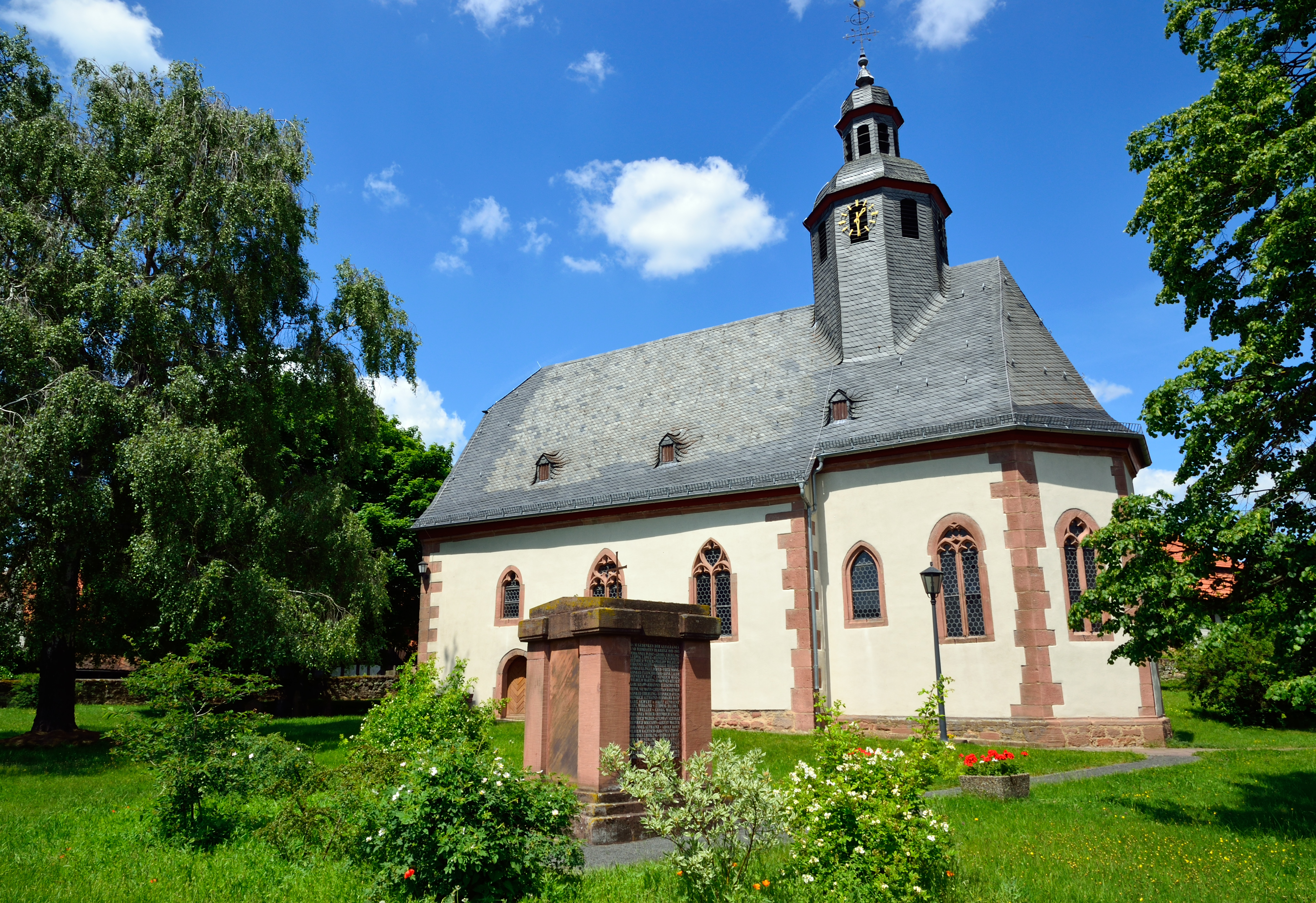 St.-Jakobi-Kirche in Langenstein (Kirchhain)